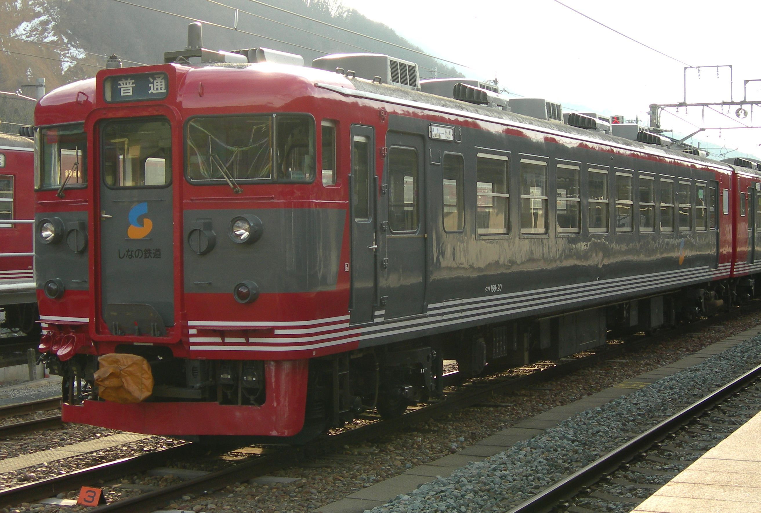 しなの鉄道169系